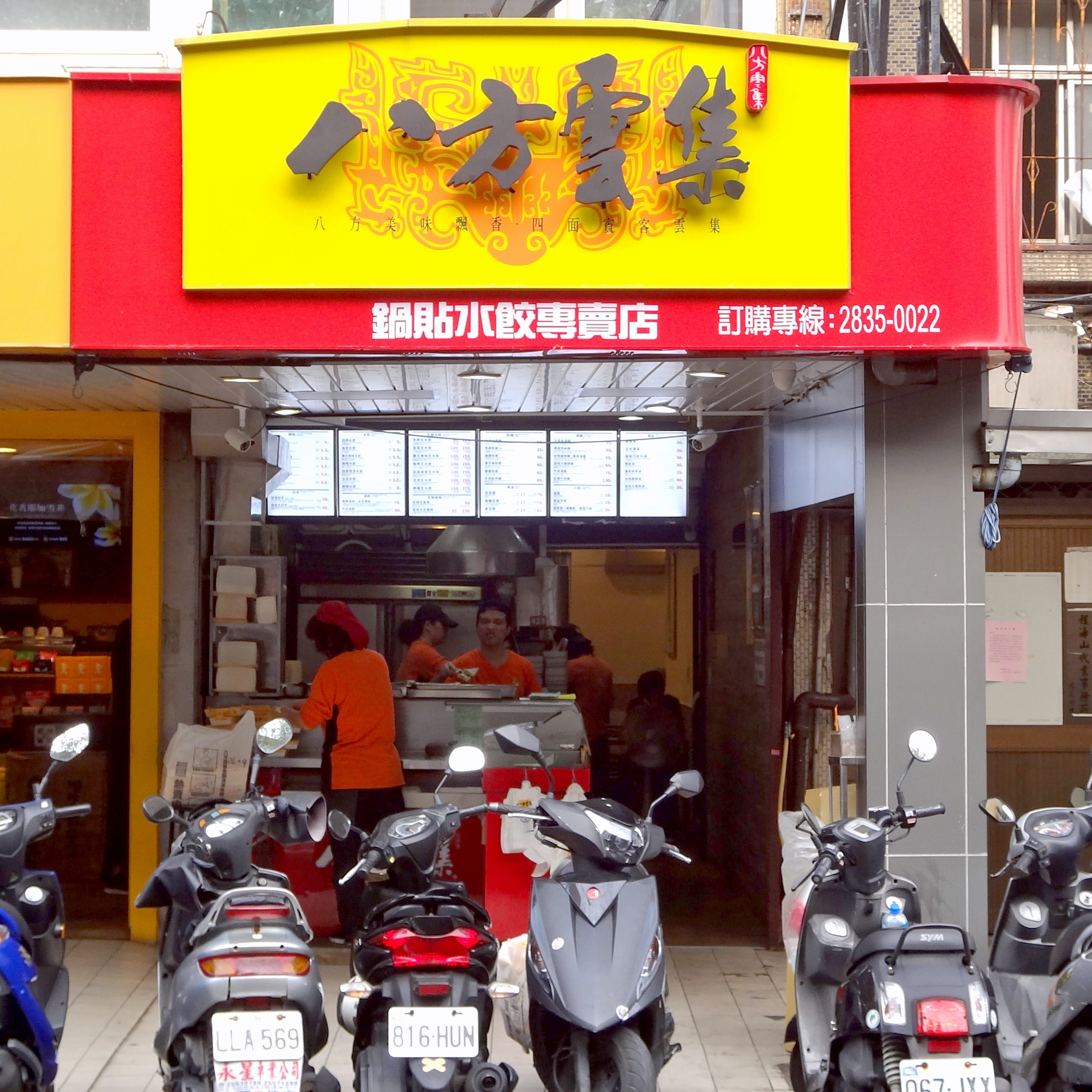 八方雲集鍋貼水餃專賣店芝山店，地址：臺北市士林區福華路122號1樓。